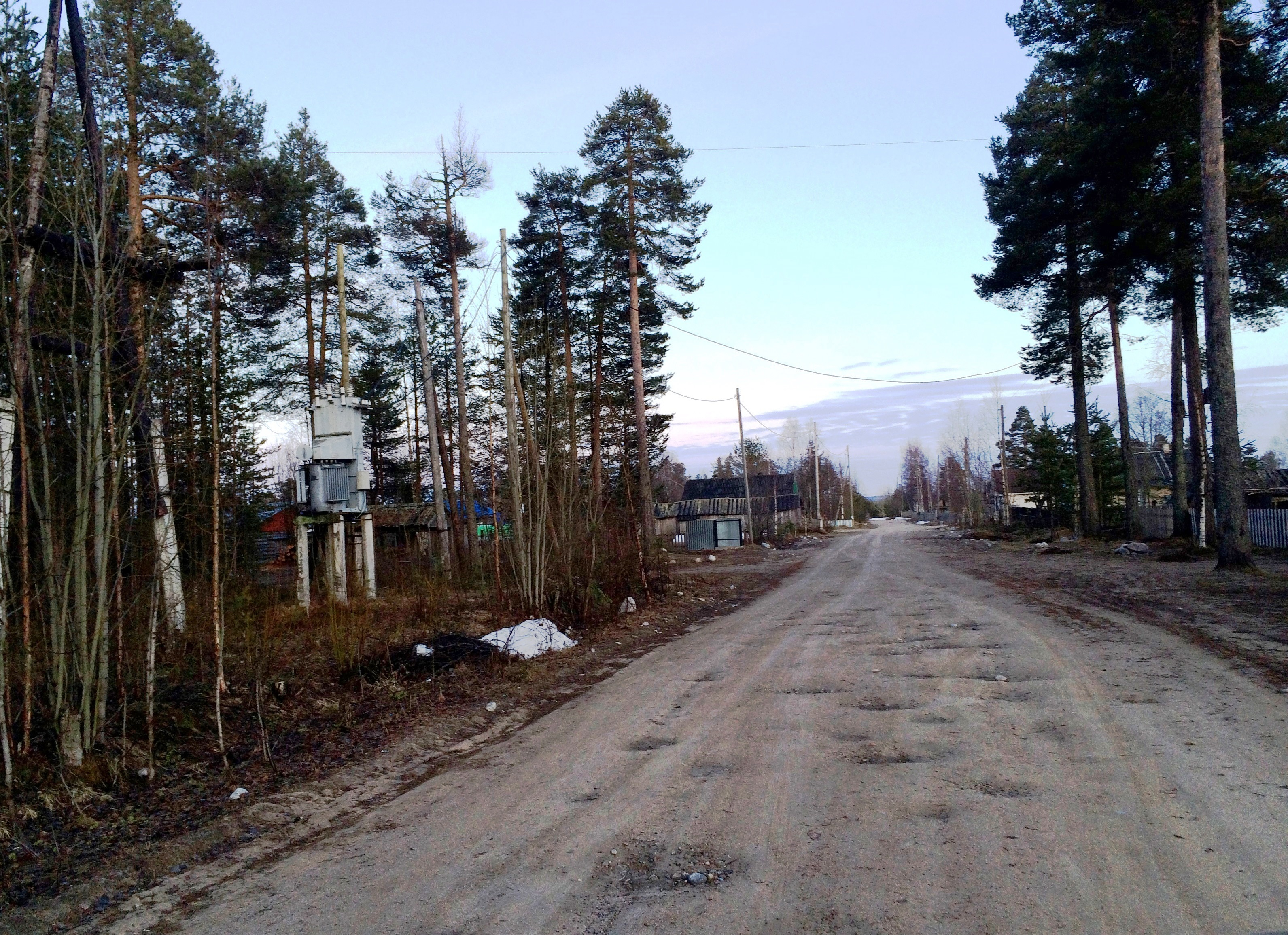 Куусиниеми